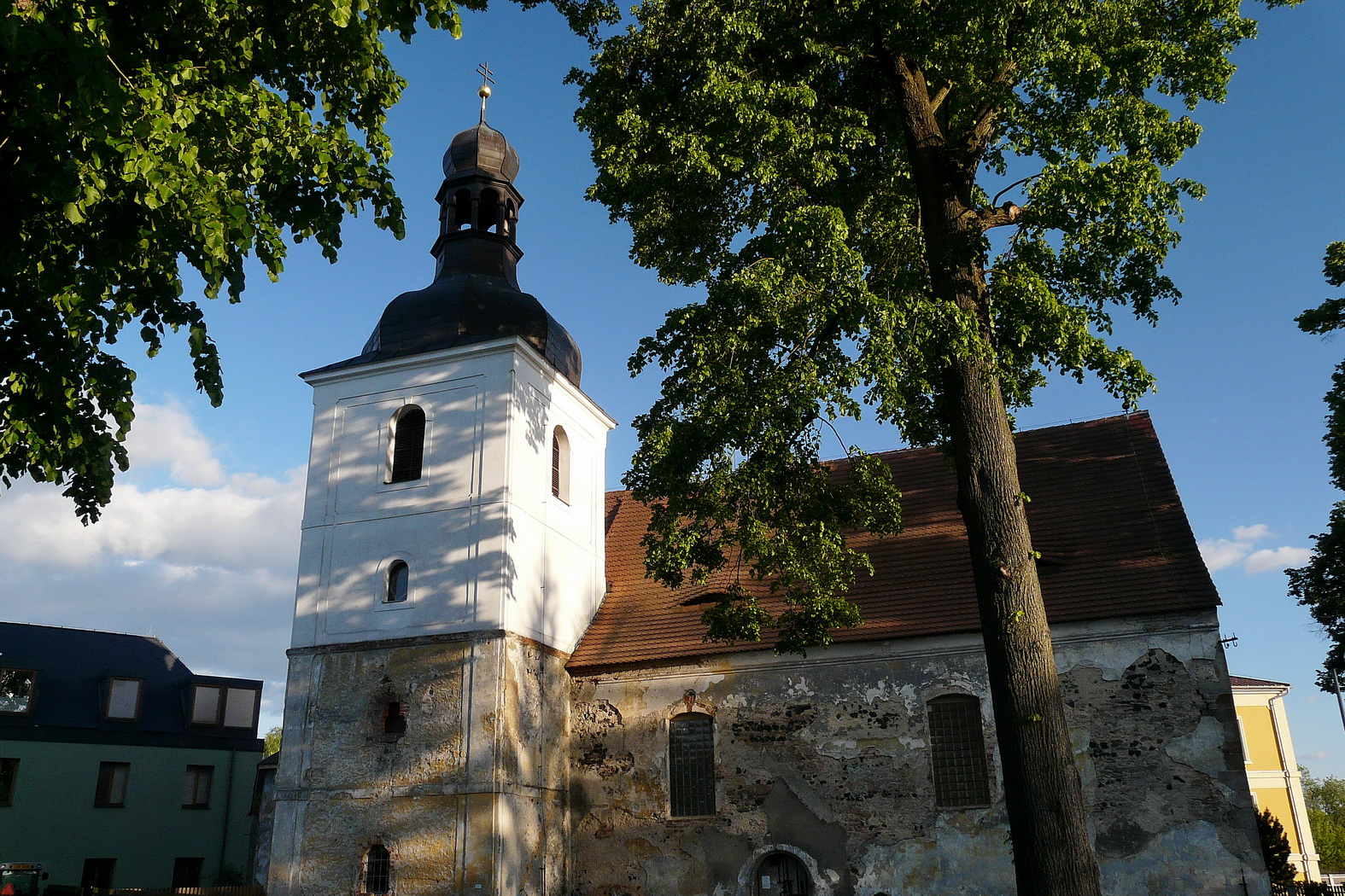 Kostel sv. Havla v Kuřívodech